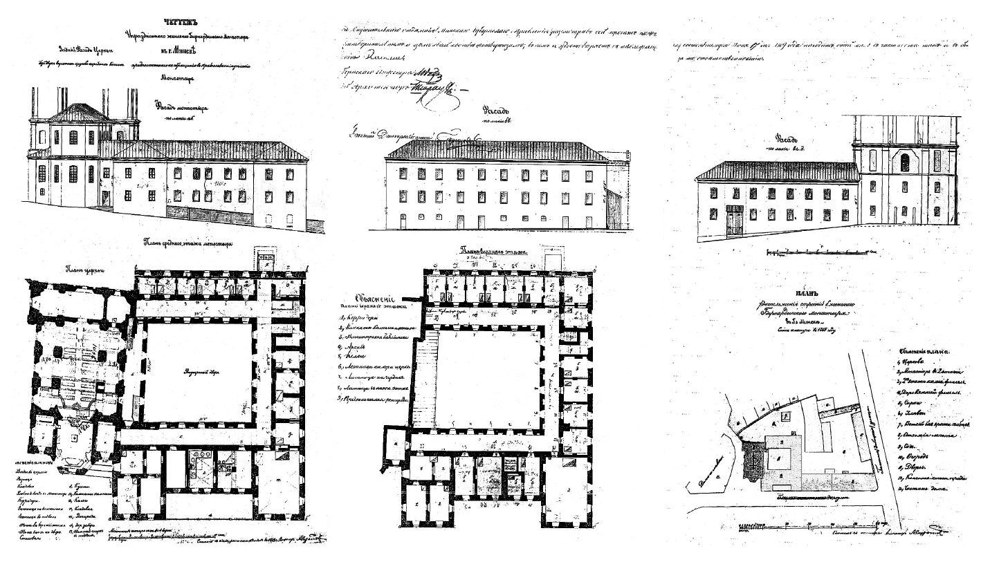 Беларуская (тарашкевіца): Менск (Miensk). Касьцёл Зьвеставаньня Найсьвяцейшай Панны Марыі і кляштар бэрнардынак, абмеры